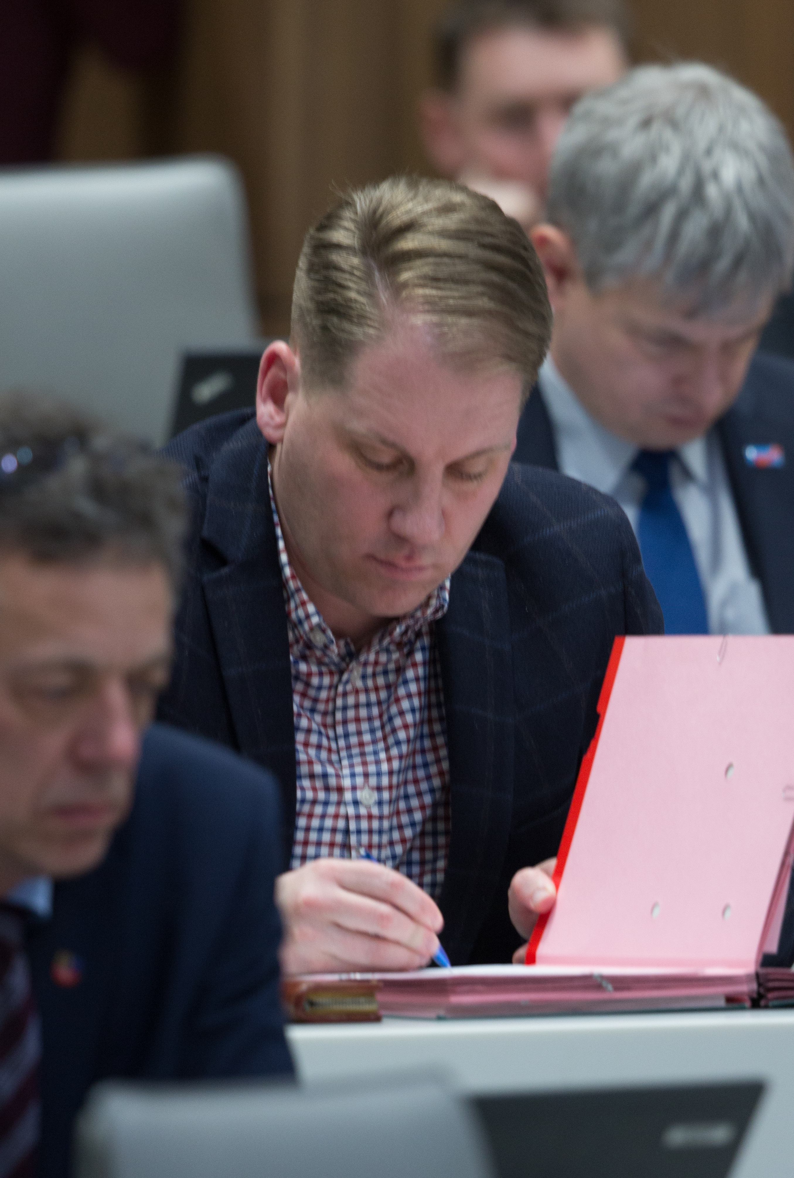 Peer Lilienthal am 28. Februar 2018 im Plenum des Niedersächsischen Landtages.